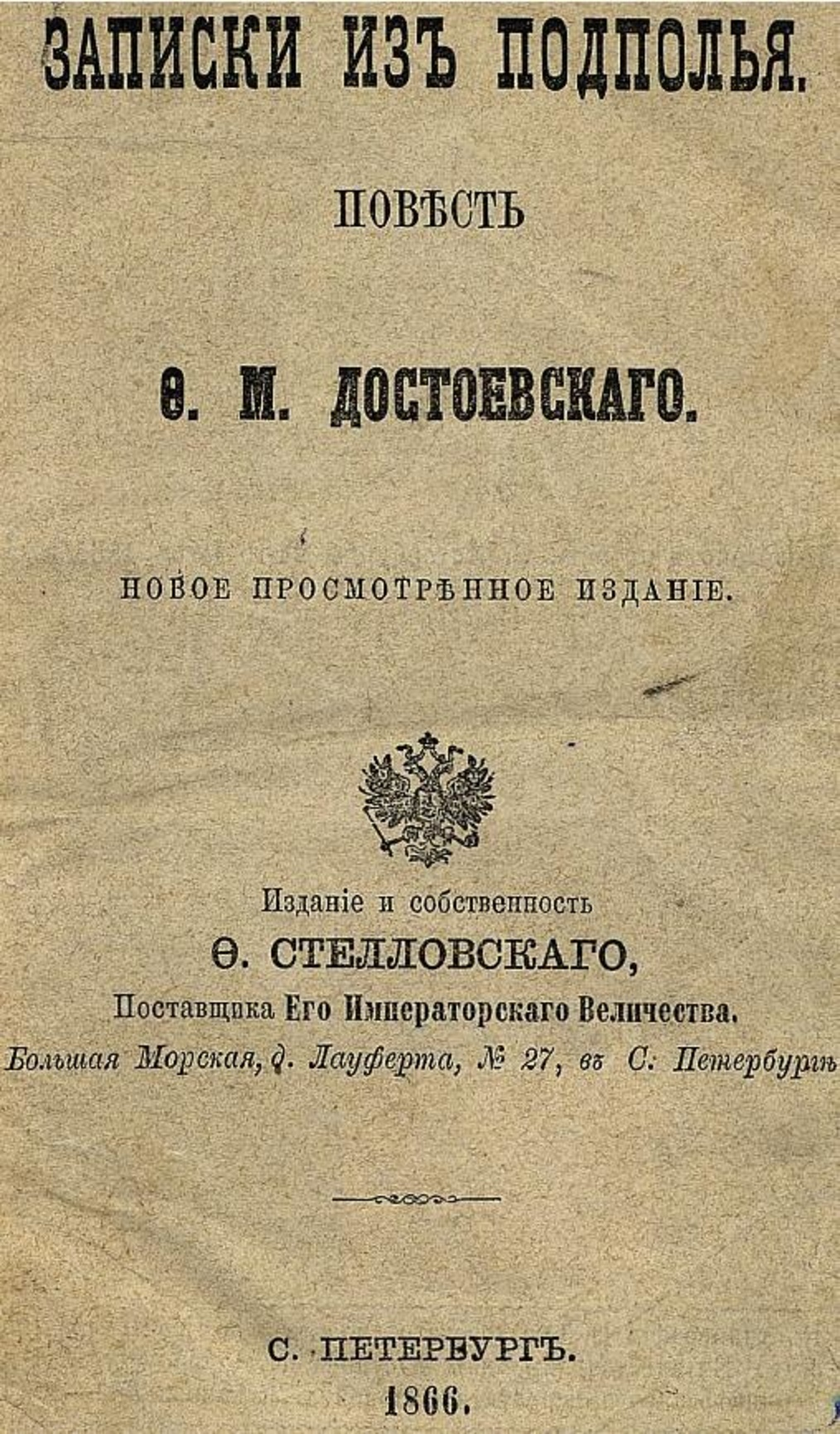 Достоевский, Федор Михайлович Записки из подполья : Повесть Ф.М. Достоевского Санкт-Петербург Ф. Стелловский 1866. Обложка